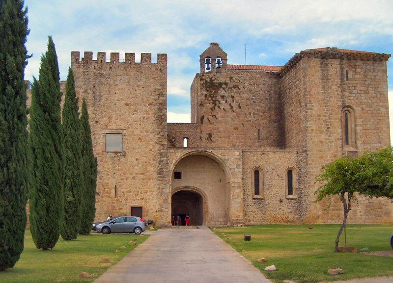 Flor da Rosa é uma freguesia portuguesa do concelho do Crato, com 10.4 km² de área e 328 habitantes (2001). Densidade: 33,2 hab/km².